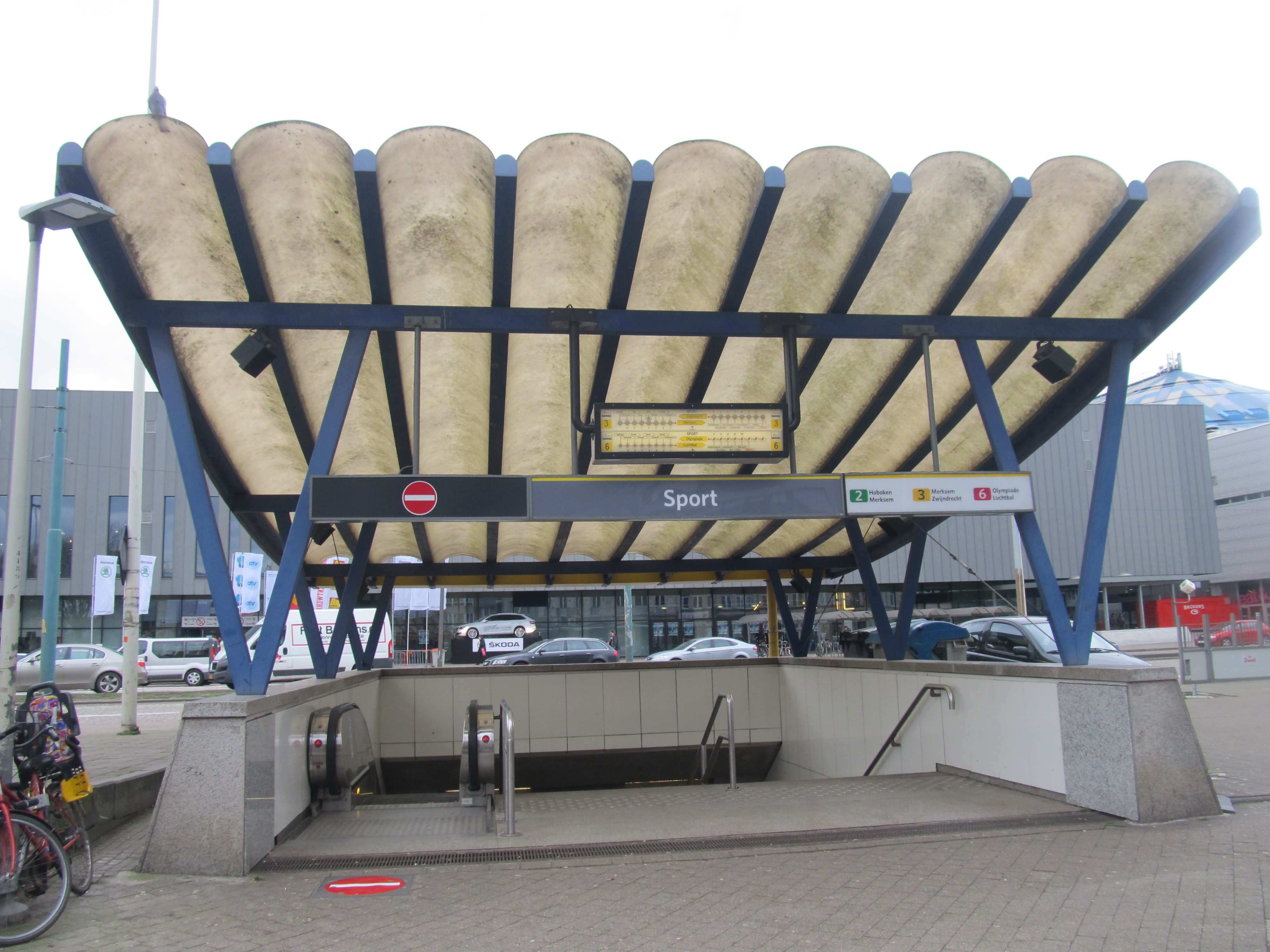 Gura de premetrou a stației Sport de pe partea dreaptă a Schijnpoortweg.